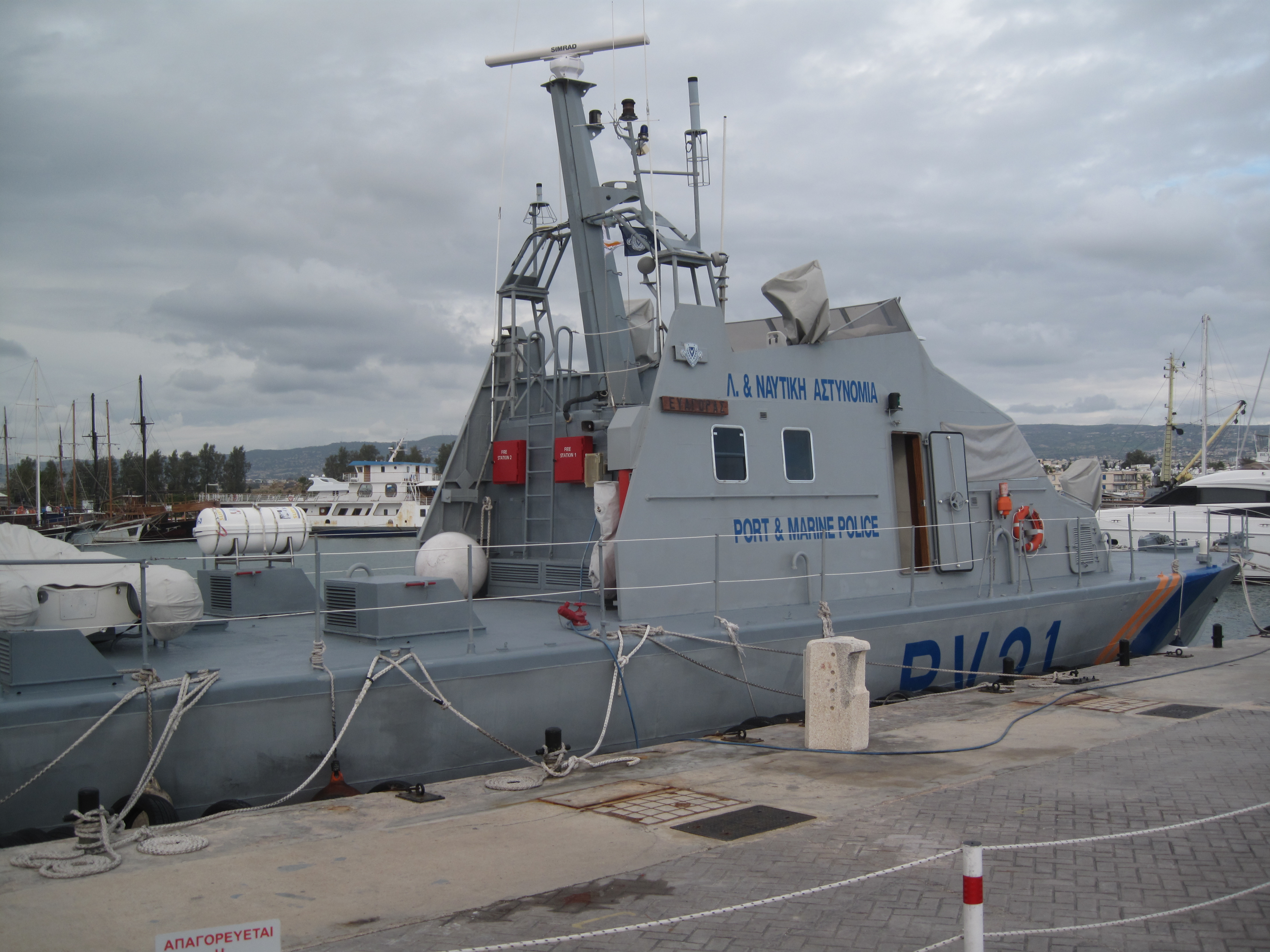 politieboot van Cyprus